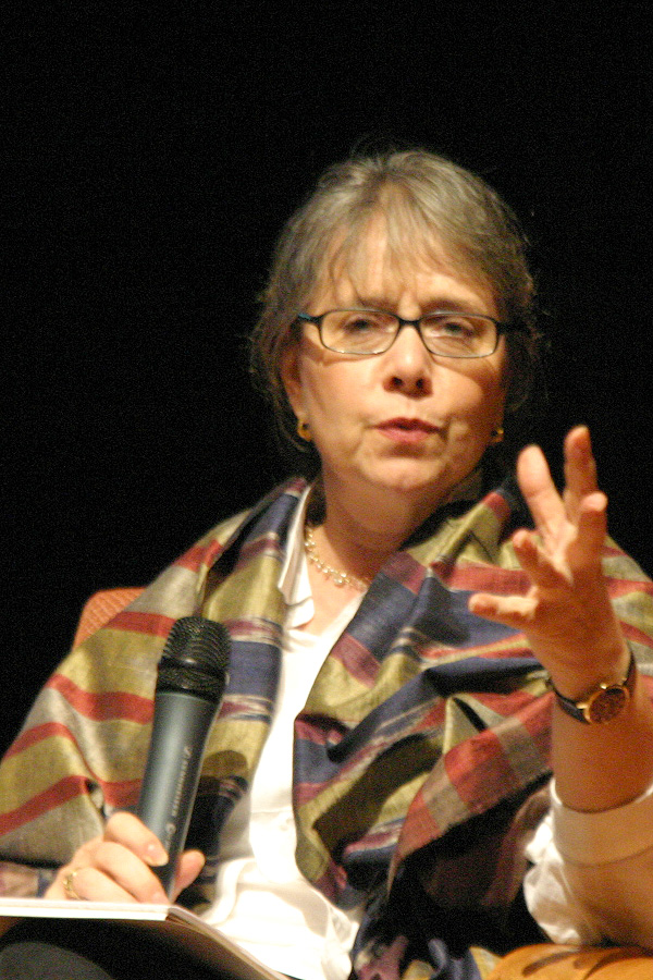 Rhoda Grauer in I la Galigo Forum, Esplanade, Singapore 13 March 2004